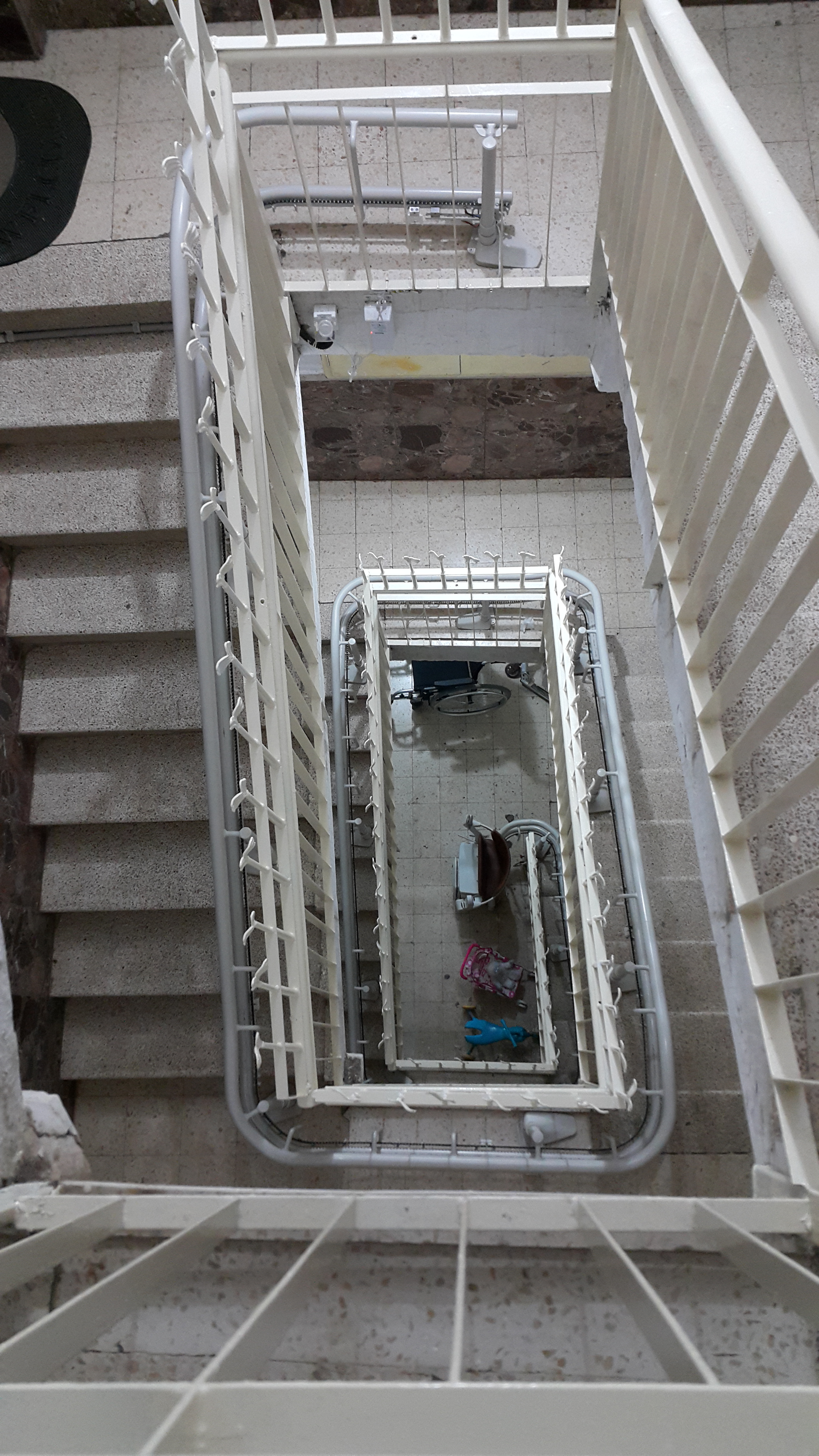 מושב מעלית לנכים בבניין מגורים